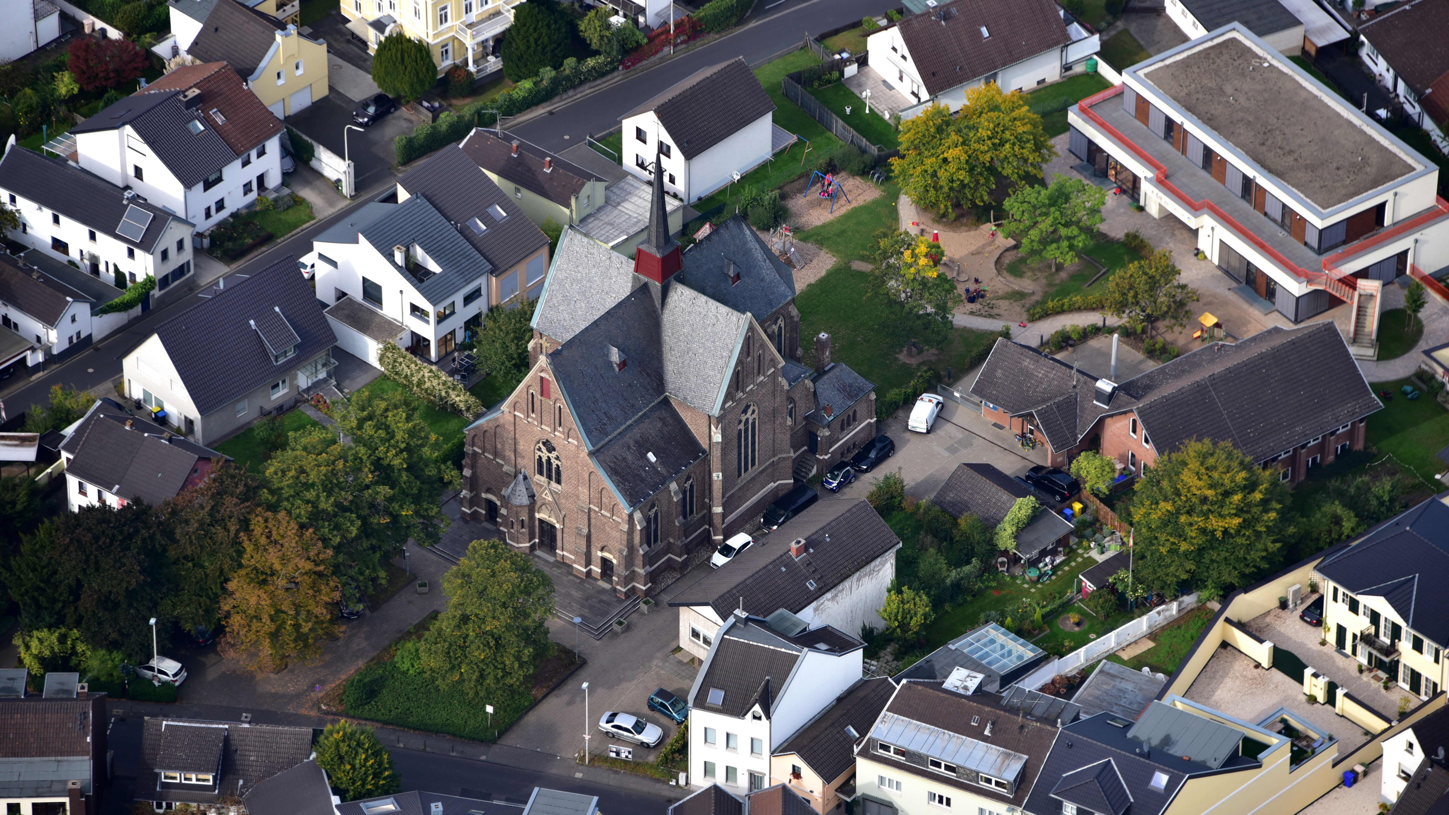 Katholische Pfarrkirche St. Barbara, Bonn-Ippendorf: Luftaufnahme (2017)